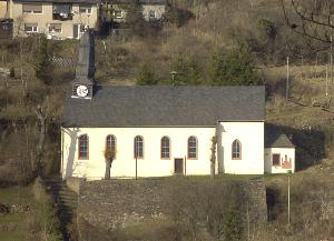 Burgkapelle Schönecken